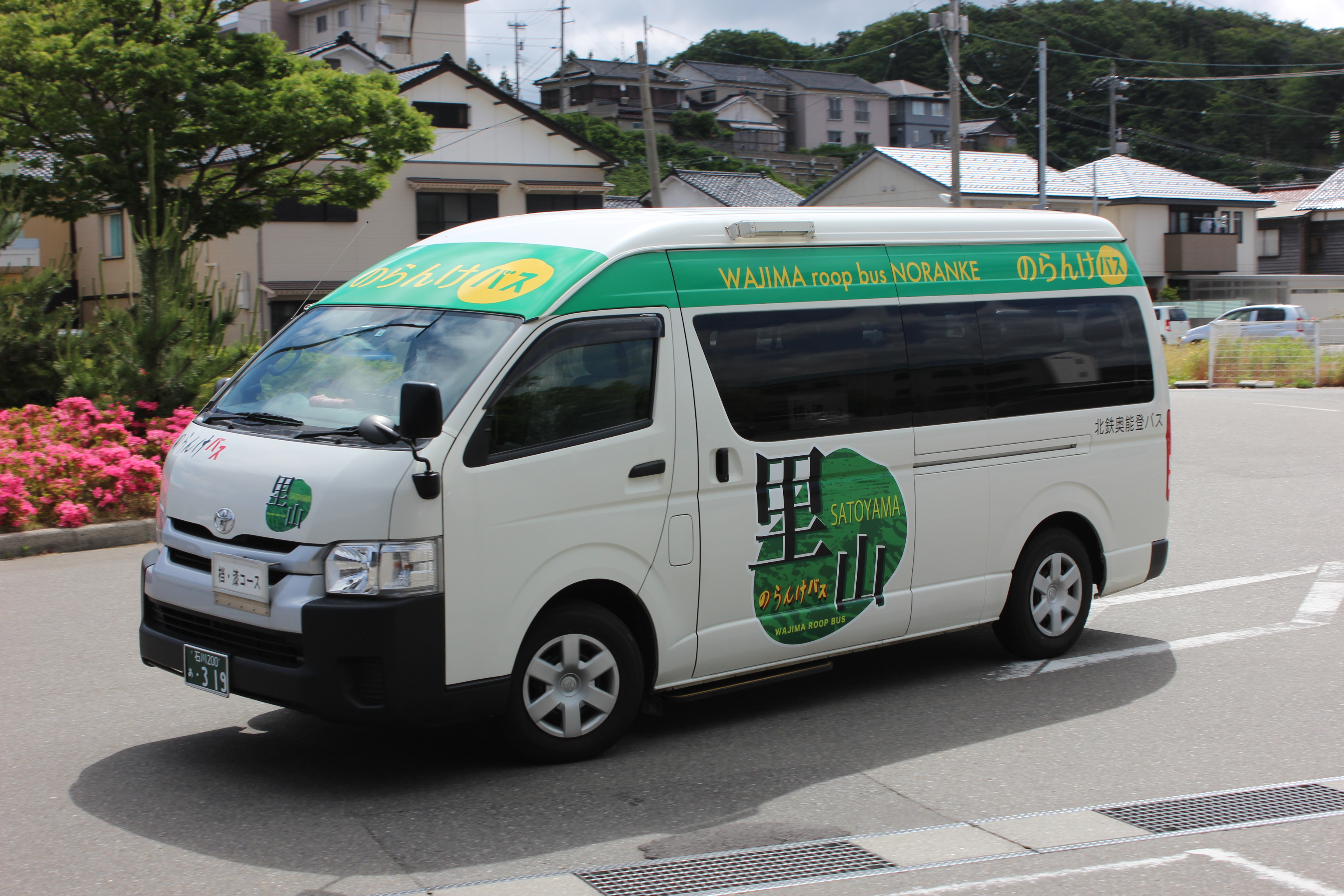 石川県輪島市のコミュニティバス「のらんけバス」（里山デザイン）。 Canon EOS Kiss X5